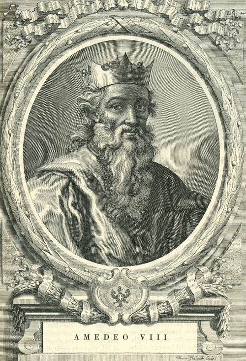 Amedeo VIII di Savoia (1383 - 1451)